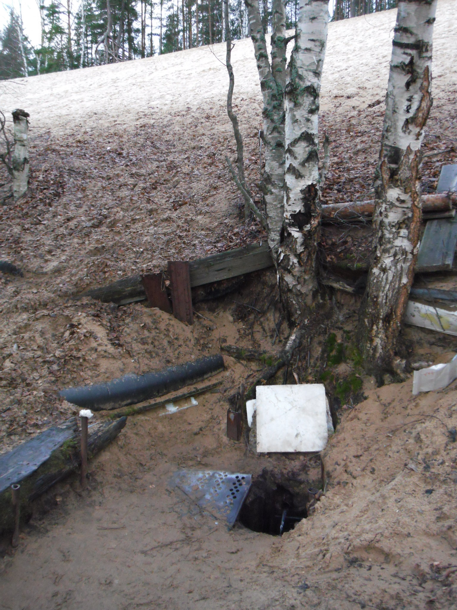 Сестрорецк на берегах Ржавой канавы